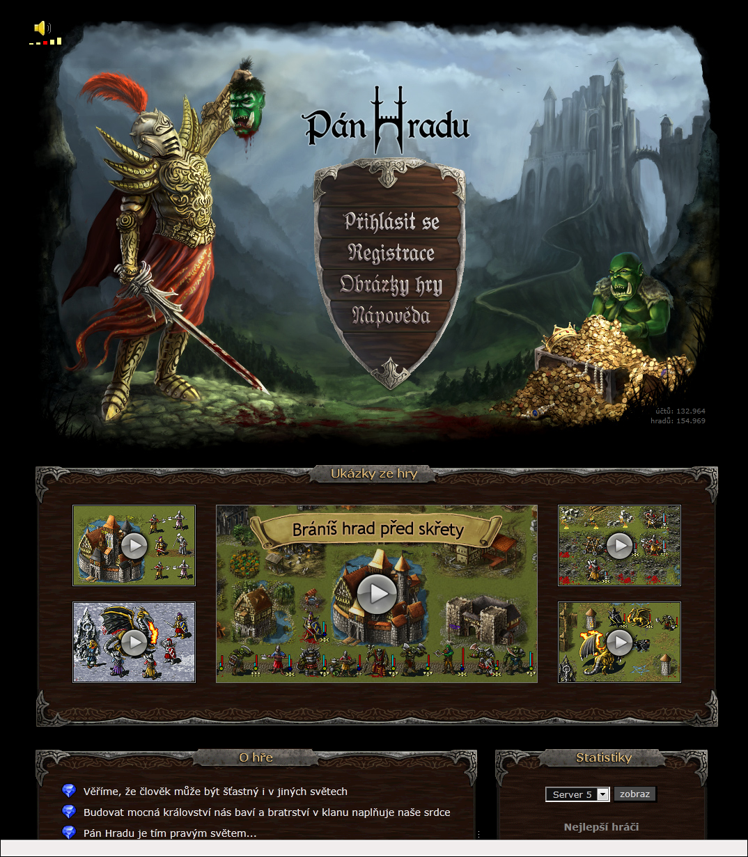 Titulní stránka Pán Hradu